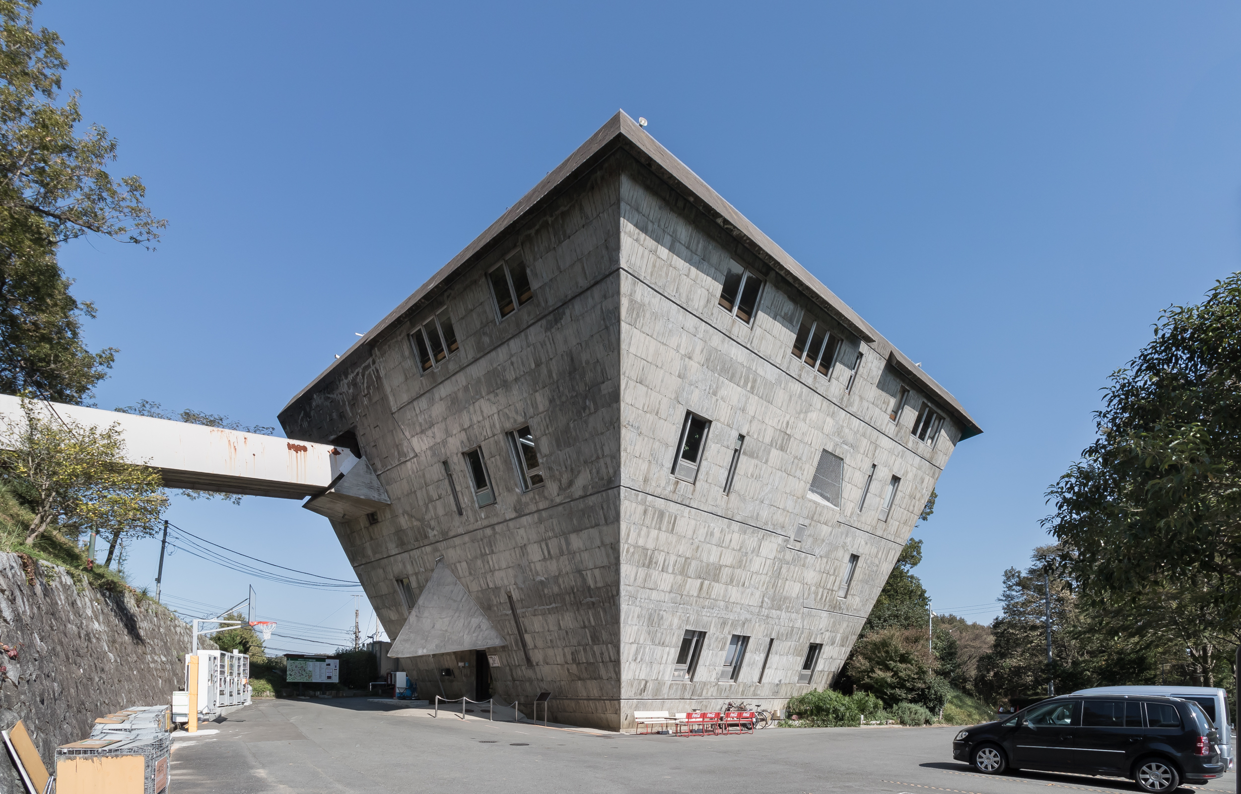 大学セミナーハウス（東京都八王子市）、本館。 吉阪隆正+U研究室設計。